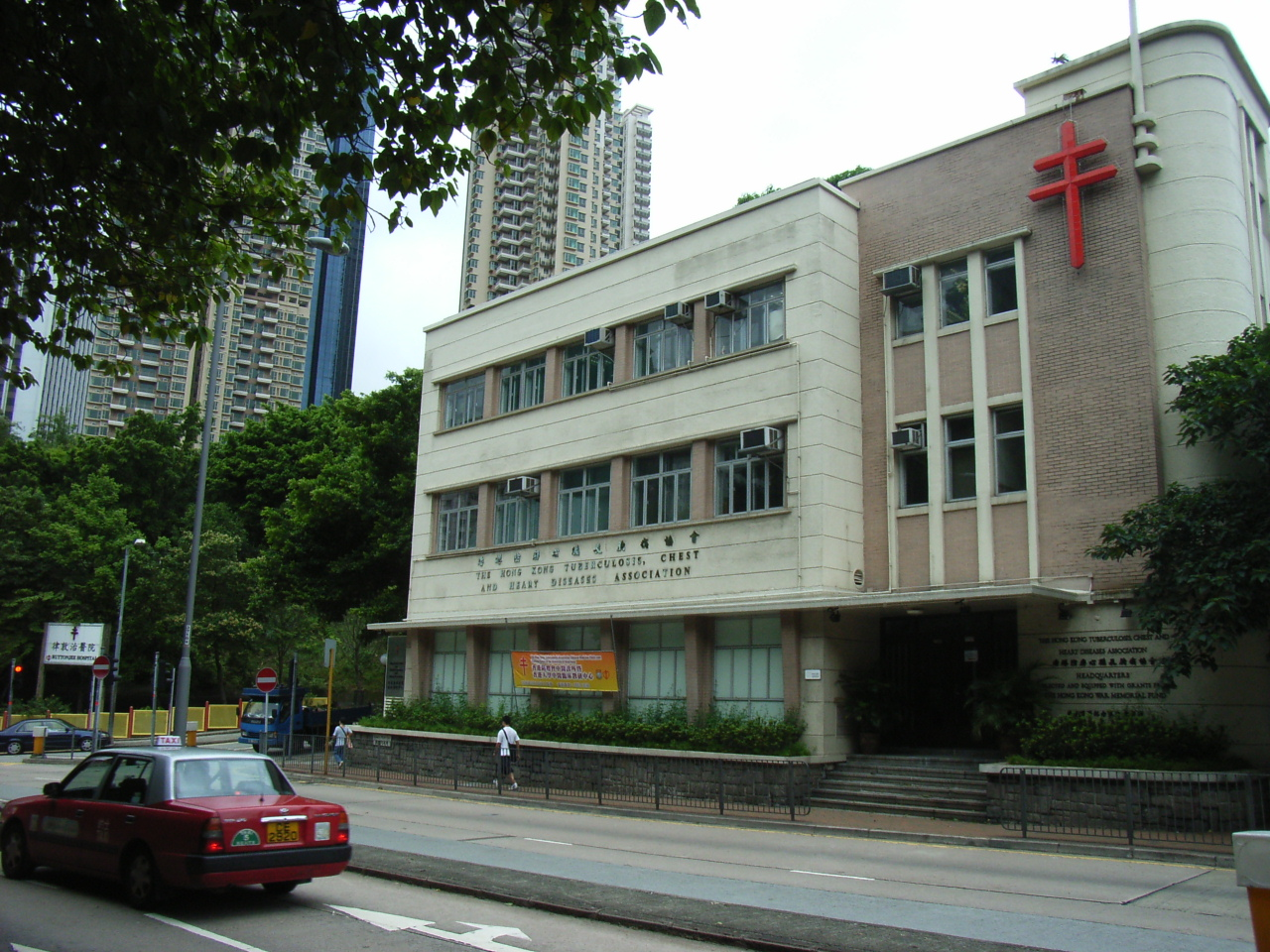 律敦治醫院 Ruttonjee Hospital BY RICHARD MARTIN.